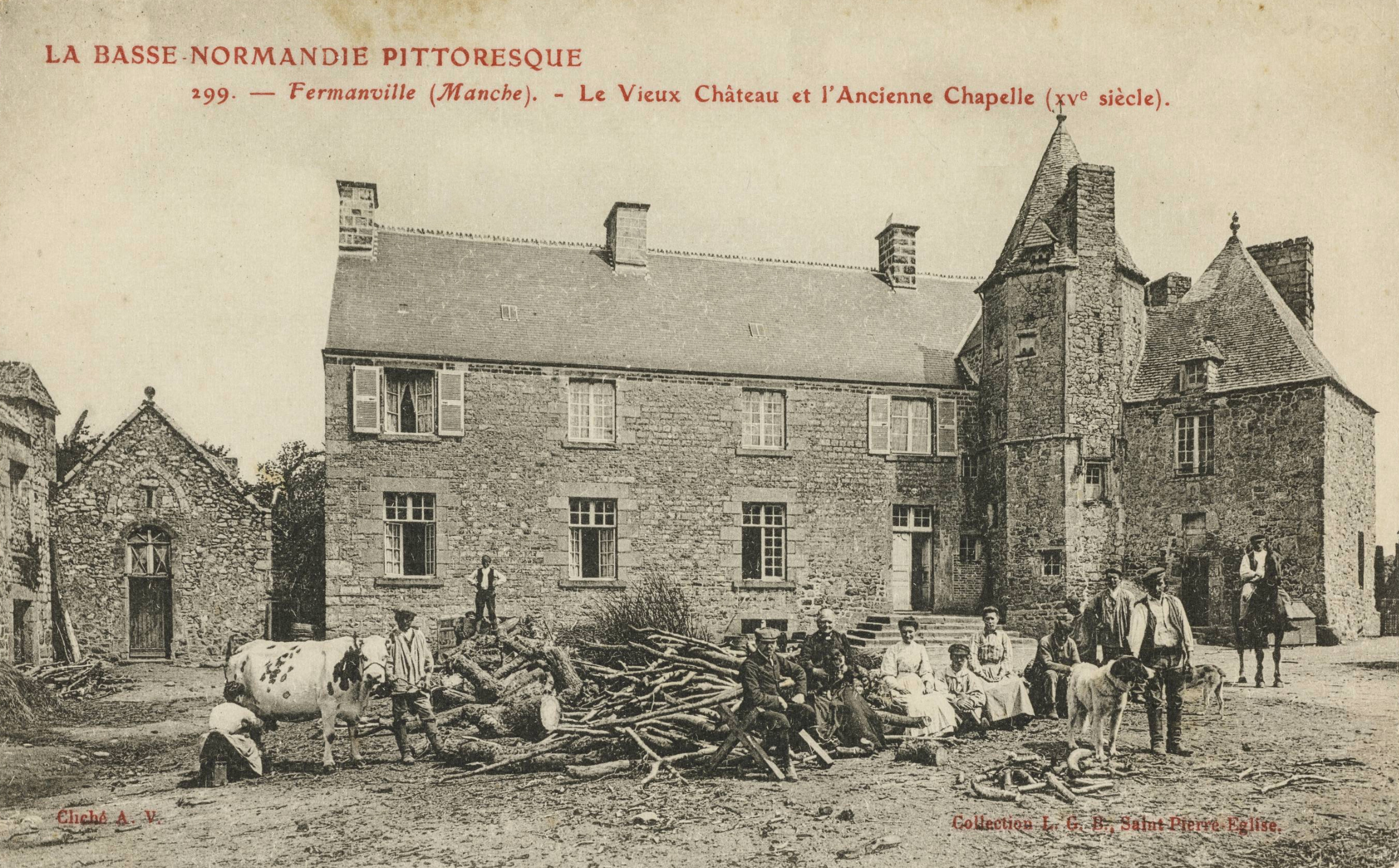 Le manoir d'Inthéville à Fermanville, Normandie.